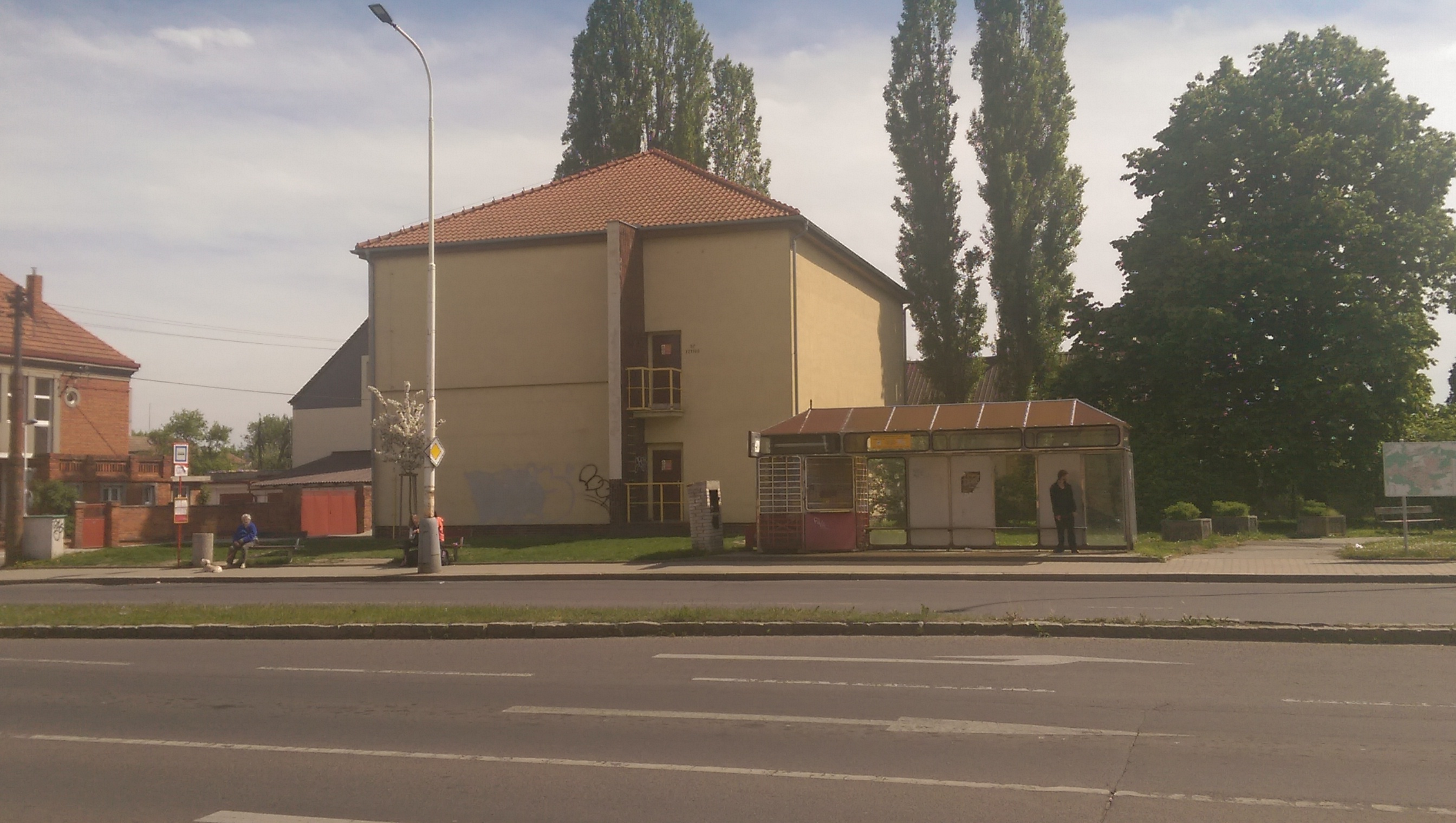 Měnírna elektrického proudu v Rozdělově, vybudovaná pro trolejbusy.